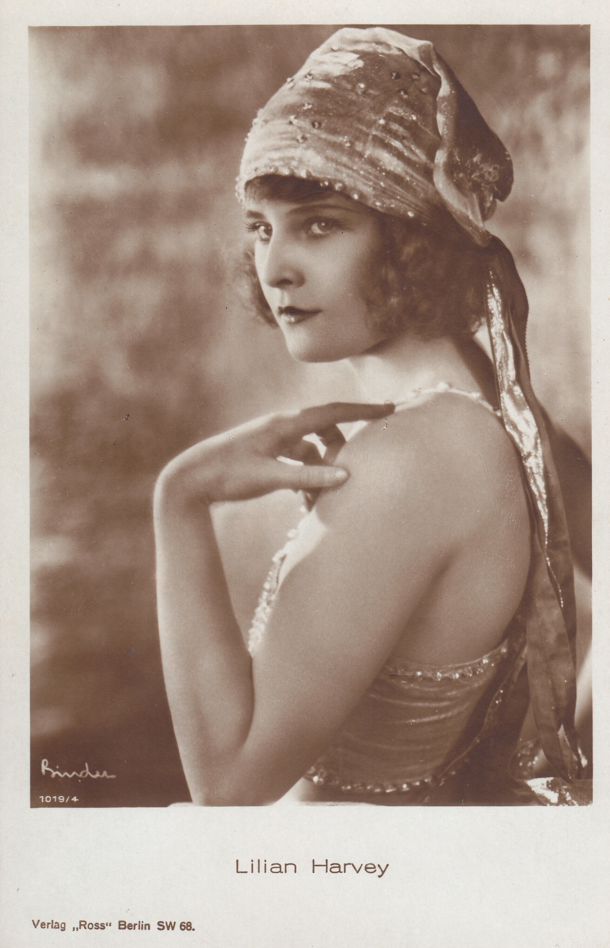 Lilian Harvey, 14 x 9 cm. Ross Verlag 1049/4